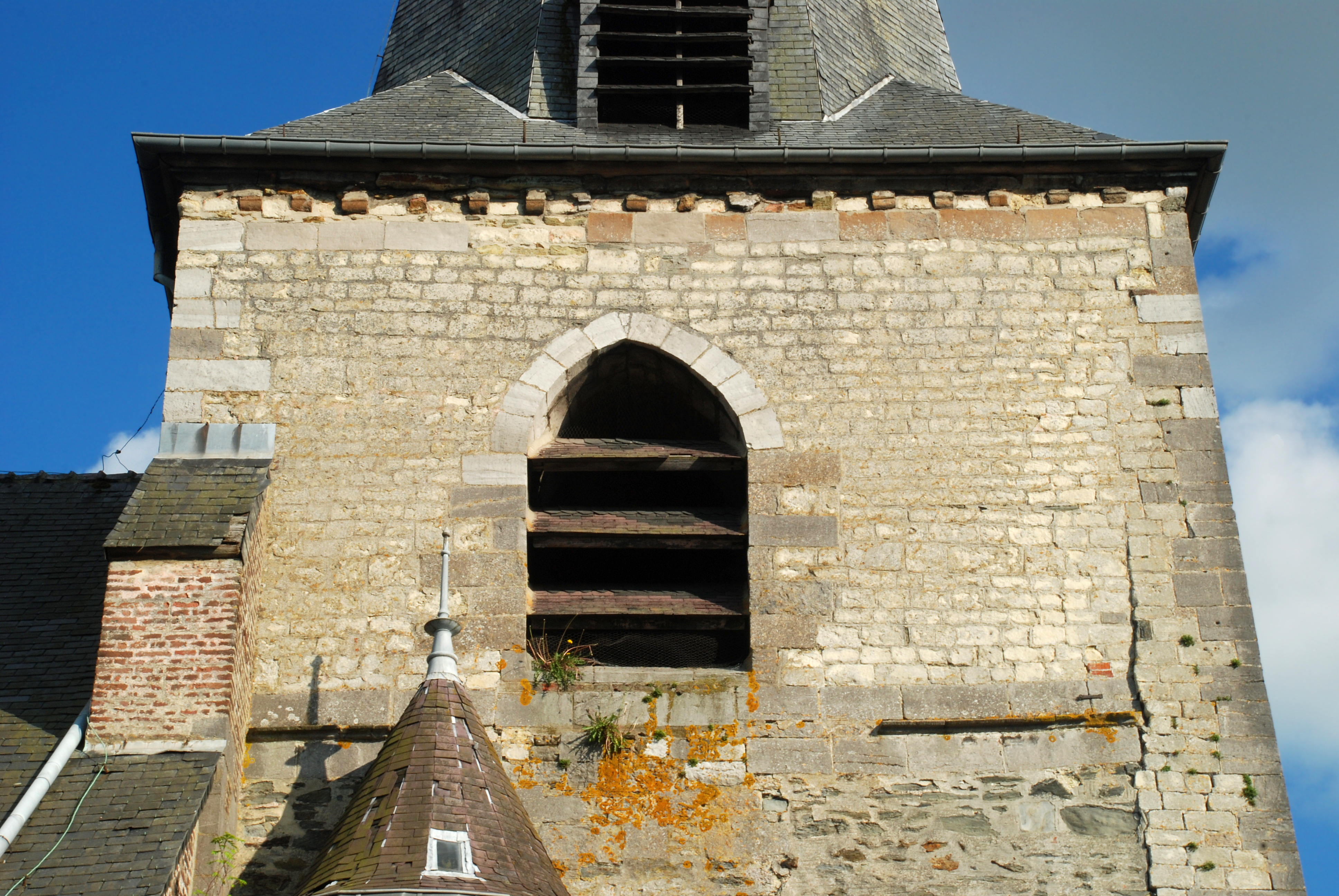 Belgique - Wallonie - Brabant wallon - Église de Court-Saint-Étienne